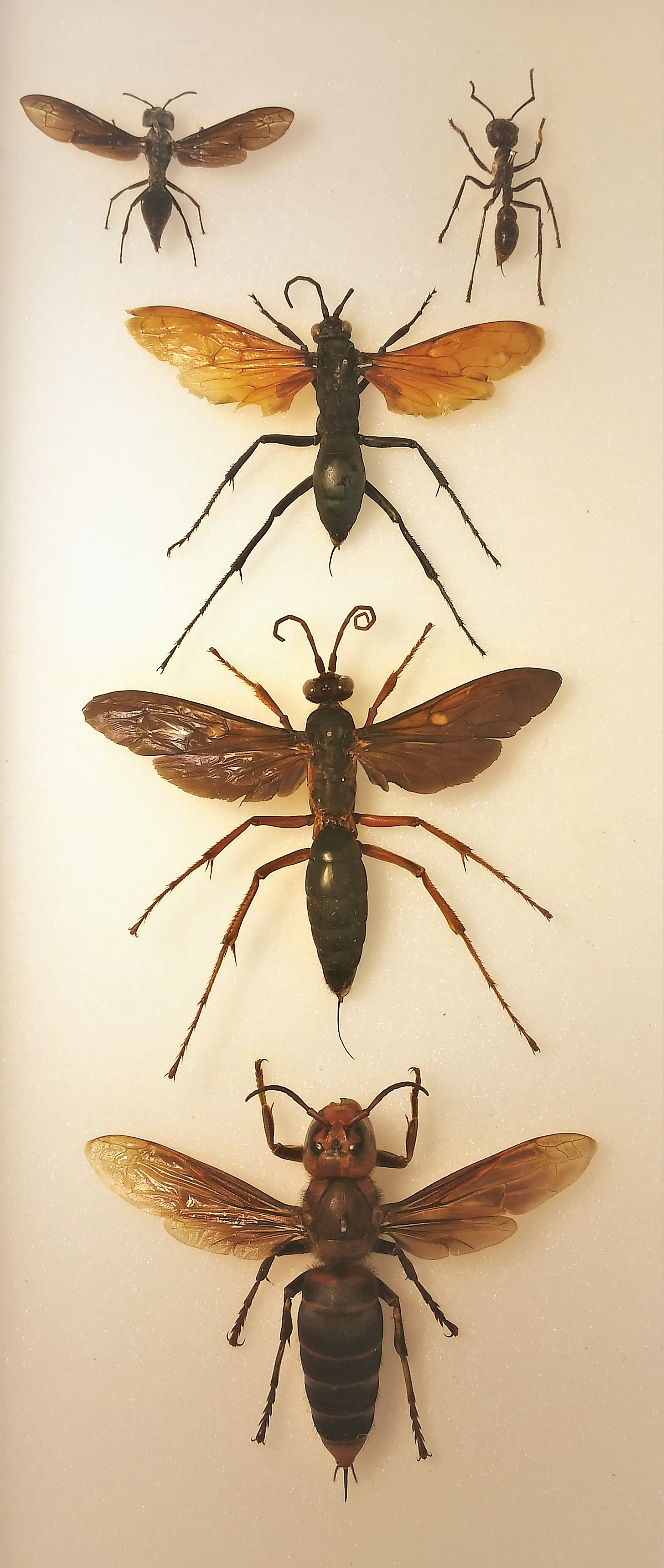 Composizione secondo la scala del dolore di Schmidt